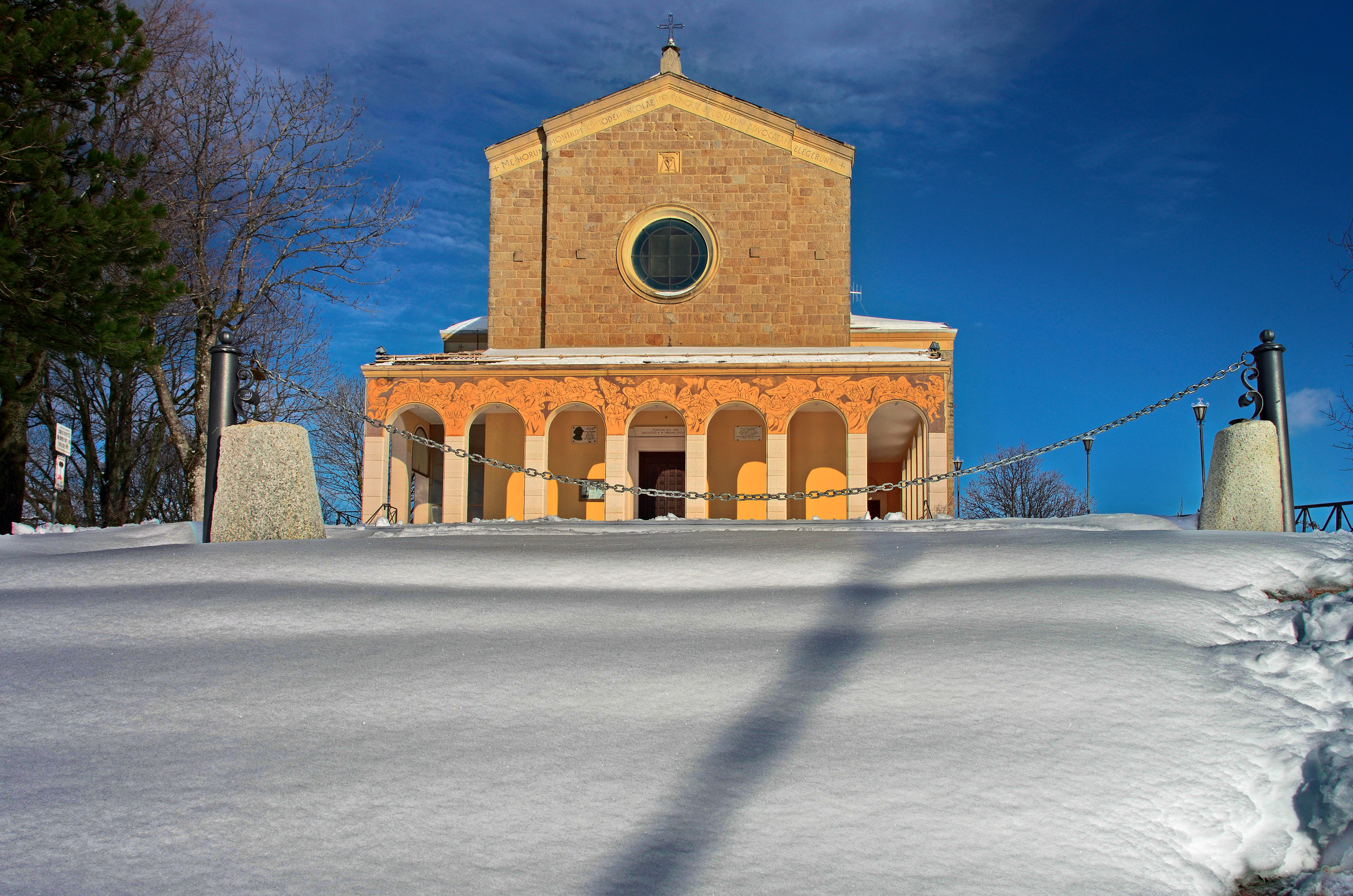 Monte delle Formiche This is a photo of a monument which is part of cultural heritage of Italy.